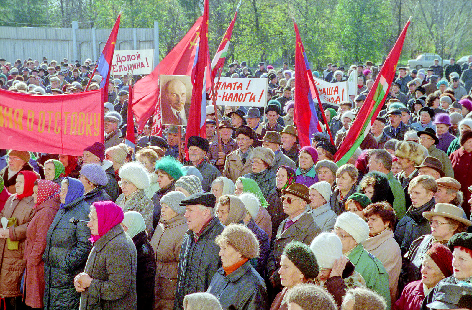 7 октября 1998 года на Народной площади состоялся митинг трудящихся и ветеранов города Переславля и Переславского района в рамках Всероссийской акции протеста профсоюзов «Нет — губительным экономическим реформам». Принята резолюция, которая потребовала отставки президента Бориса Николаевича Ельцина и выразила доверие председателю правительства Евгению Максимовичу Примакову. Лозунги на плакатах: «Ельцина в отставку», «Долой Ельцина!», «Было — зарплата! Стало — налоги!»